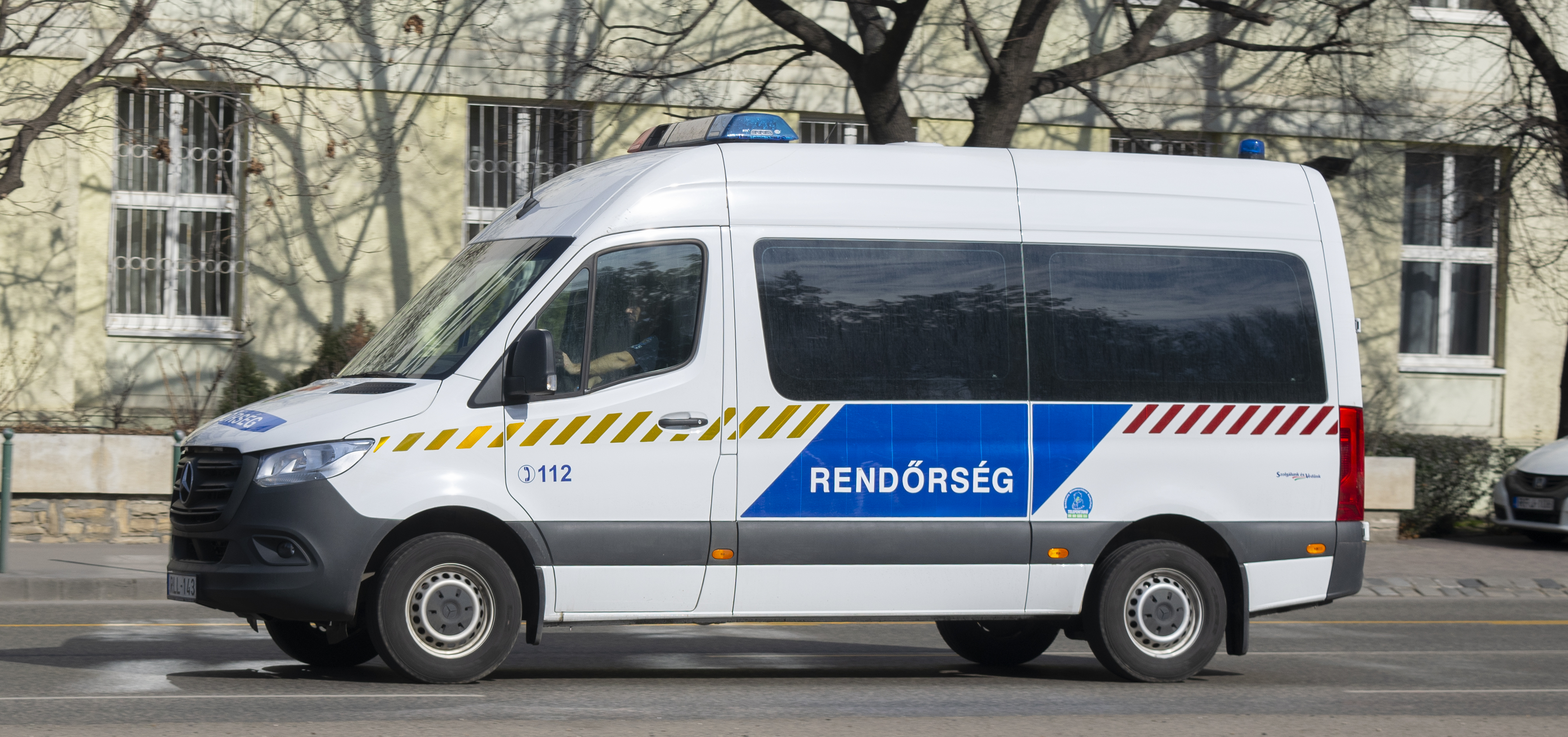 Csapatszállító